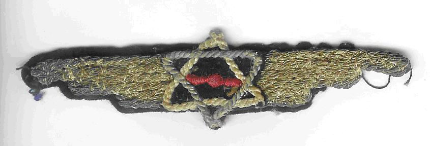 כנפי הטיסה שקיבל בנימין כהנא לאחר סיום קורס הטייס של אצ"ל